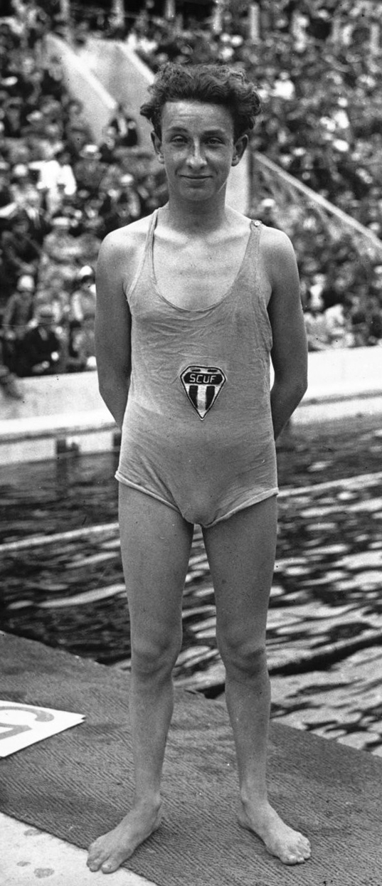 Réunion internationale aux Tourelles : Taris, gagnant du 800 m (portrait) : [photographie de presse] / Agence Meurisse